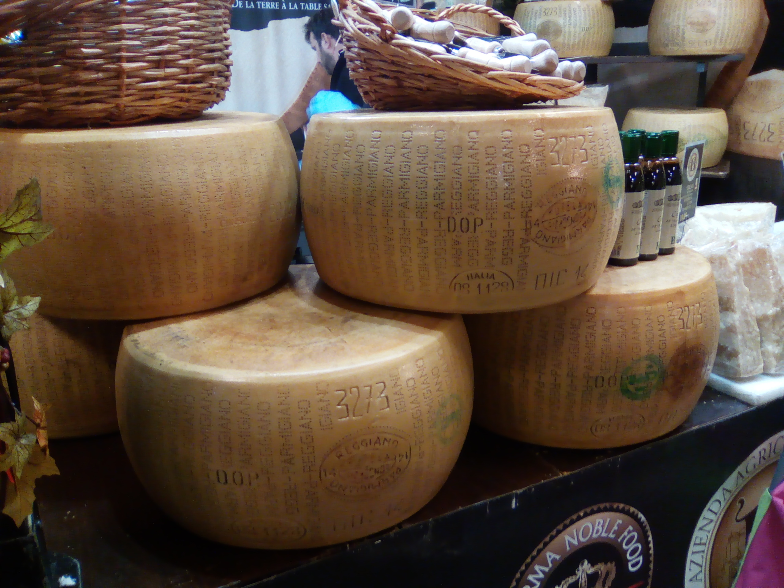 Salon Saveurs des Plaisirs gourmands.